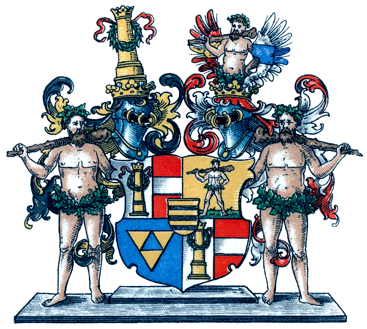 Wappen der Freiherren von Kielmannsegg von 1679